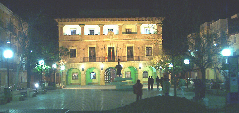 Ajuntament de Fraga, Aragon.